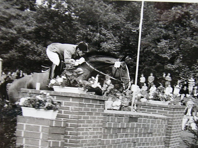 Alwin Schockemöhle , ca 1965 SB Springen Wilhelmshaven